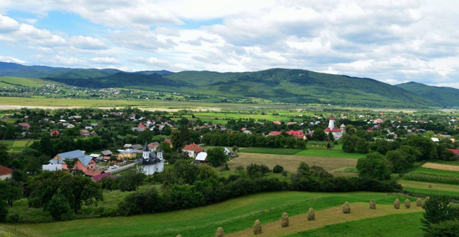 Vedere de ansamblu a zonei de lunca a satului Capu-Codrului